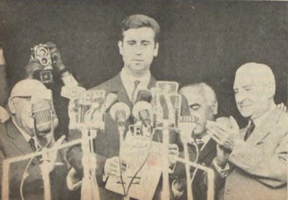 A foto do Alferes Miliciano Robles, em que se vê o Sr. Professor Doutor Oliveira Salazar, extraída do Jornal do Exército n.º 45 de Setembro de 1963.